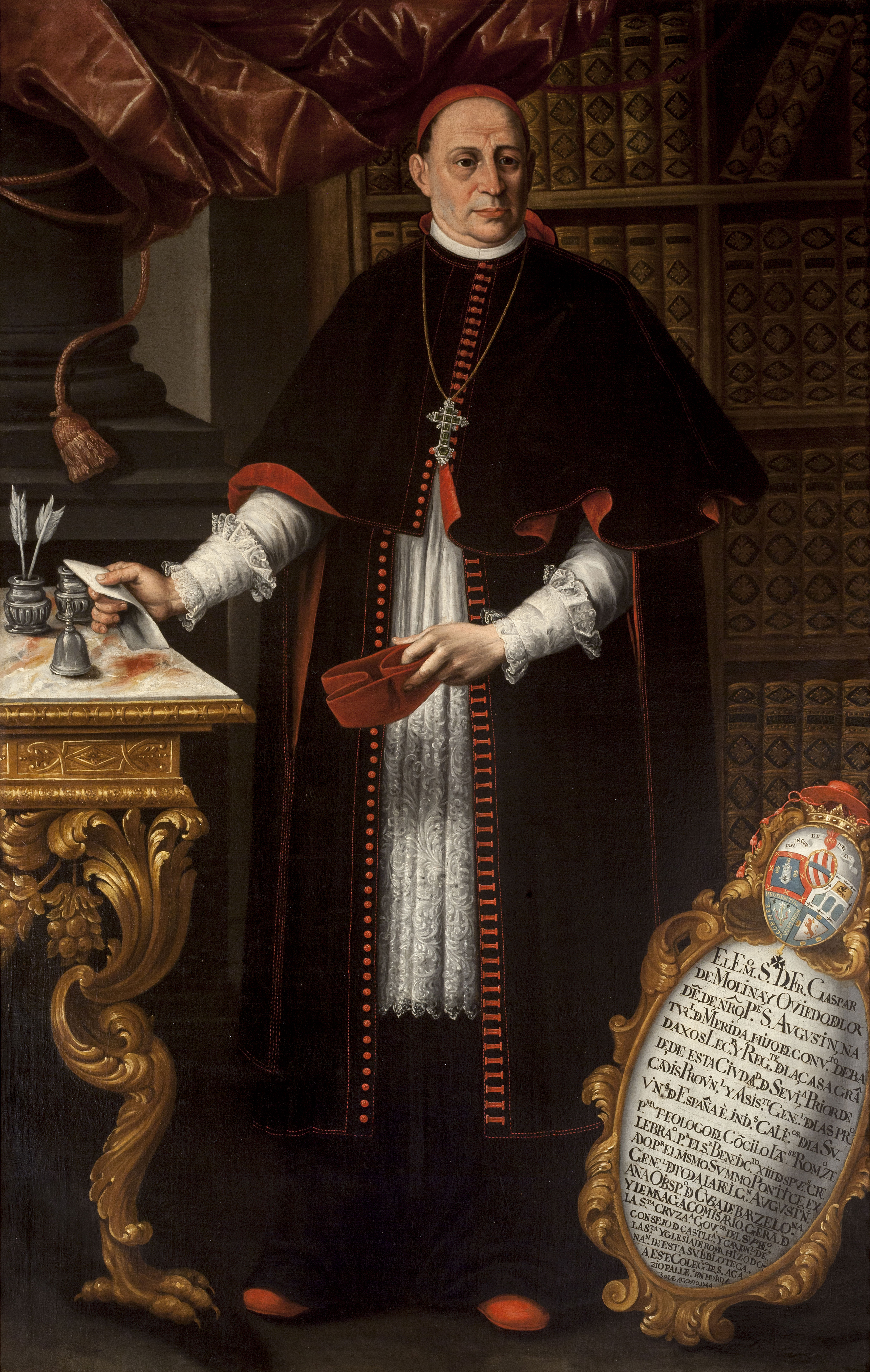 Retrato del eclesiástico español Gaspar de Molina y Oviedo (1679-1744), que llegó a ser cardenal de la Iglesia Católica y también obispo de Santiago de Cuba, Barcelona y Malaga y presidente del Consejo de Castilla.